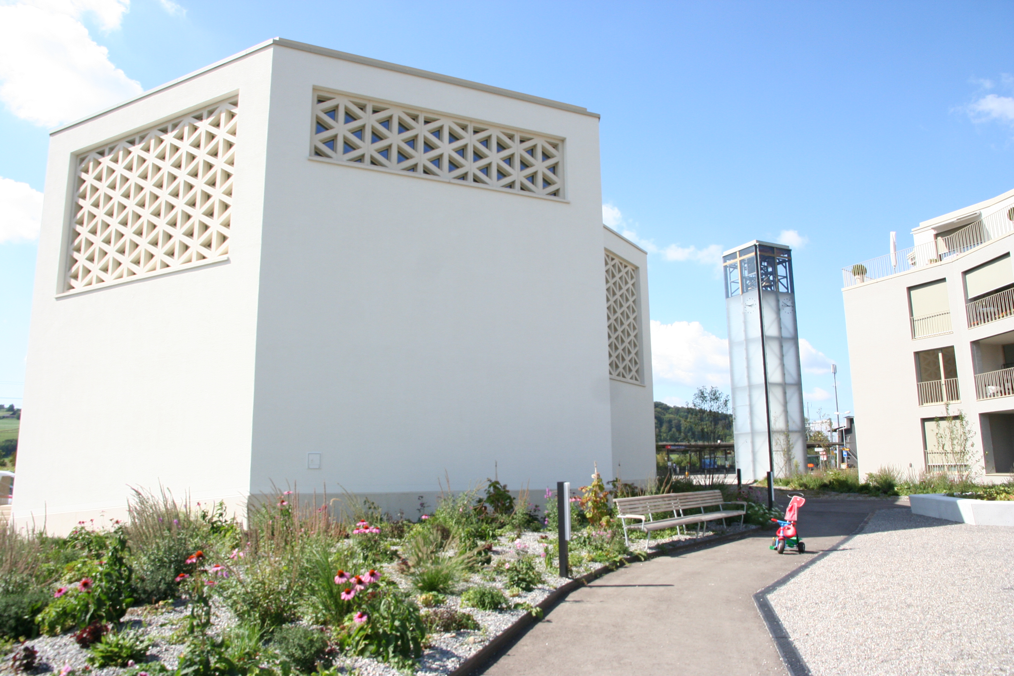 röm.-kath. Kirche St. Mauritius Bonstetten vom 2016